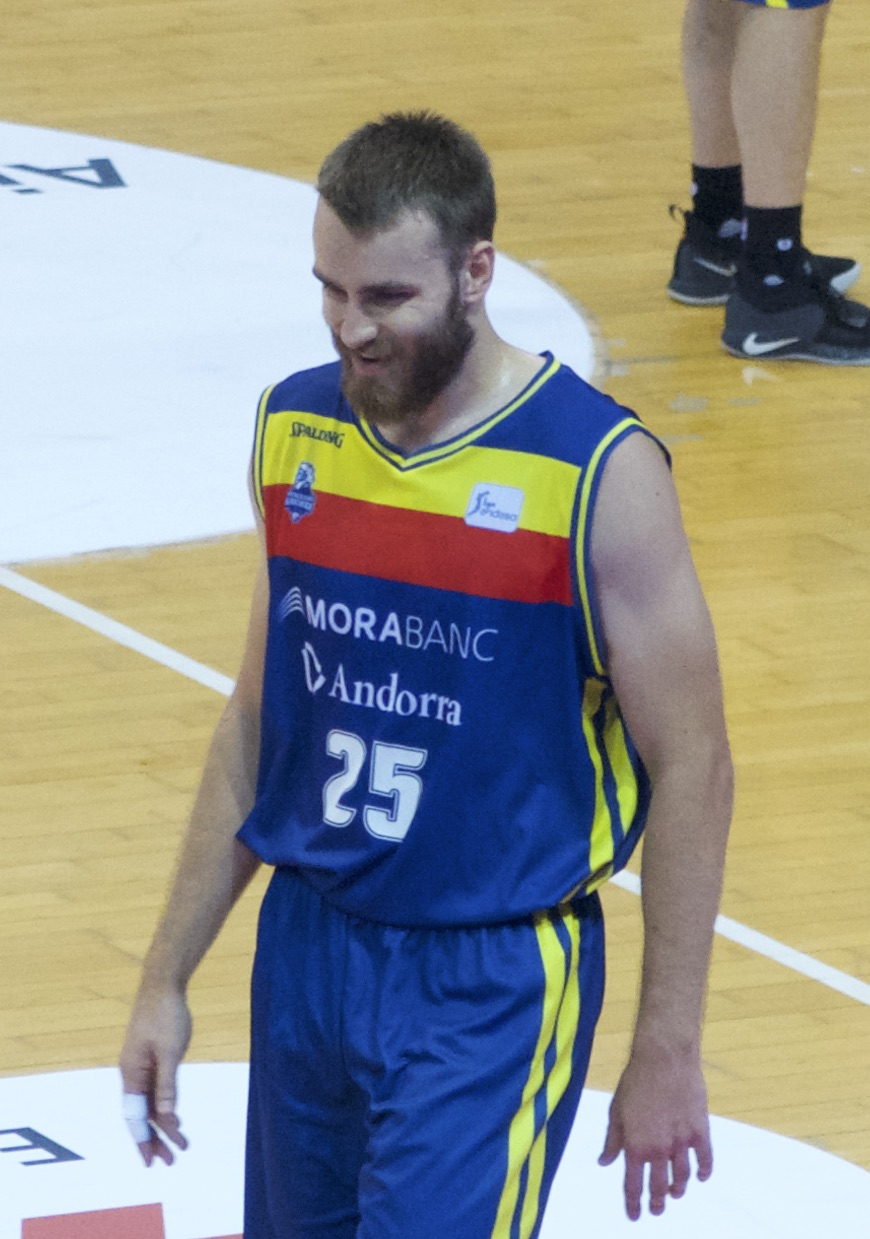 David Jelínek, jugador del Morabanc Andorra, en el partit de semifinals de la Lliga catalana 2018-19 davant el Divina Seguros Joventut.